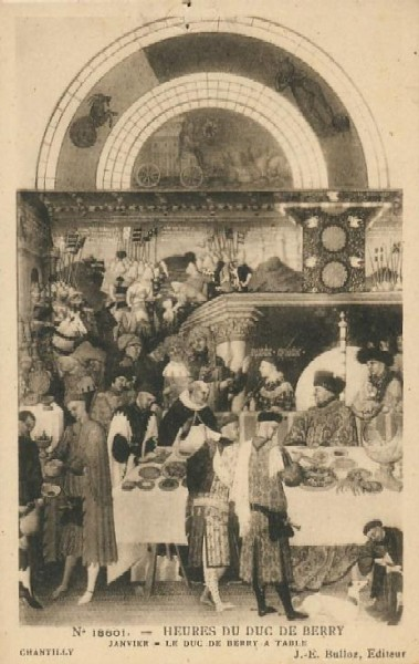 Carte postale représentant une enluminure du livre d'heures Les très riches heures du duc de Berry - Janvier - Le duc de Berry à Table, Editeur J.-E. Bulloz, Chantilly.